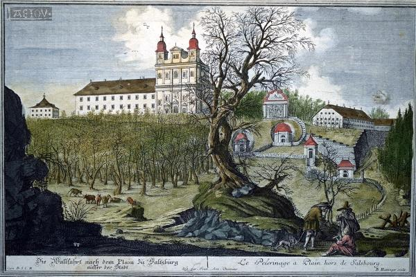 Die Wallfahrt nach dem Plain in Salzburg außer der Stadttitle QS:P1476,de:"Die Wallfahrt nach dem Plain in Salzburg außer der Stadt" label QS:Lde,"Die Wallfahrt nach dem Plain in Salzburg außer der Stadt"